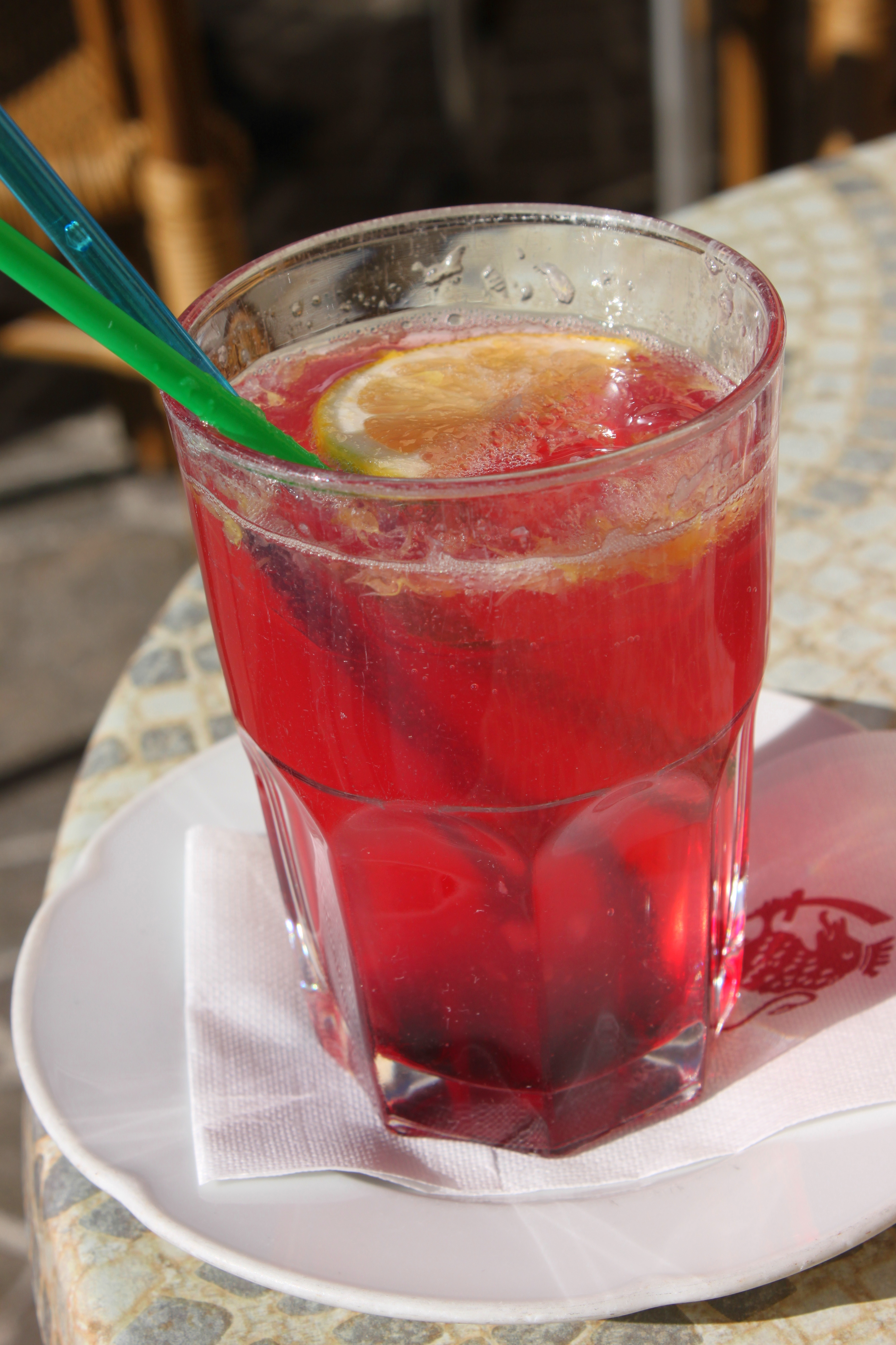 Skiwasser, Schiwasser besteht aus Himbeersirup, Zitronensaft und Wasser. Das Sirup gibt es auch fertig gemischt. Es wird in Österreich und Südtirol ausgeschenkt. Da Foto entstand in Cortina d'Ampezzo.